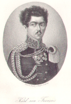 Illustation des Buches